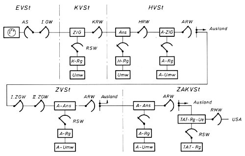 Schemazeichnung Auslandsfernwahl ab dem System T 62